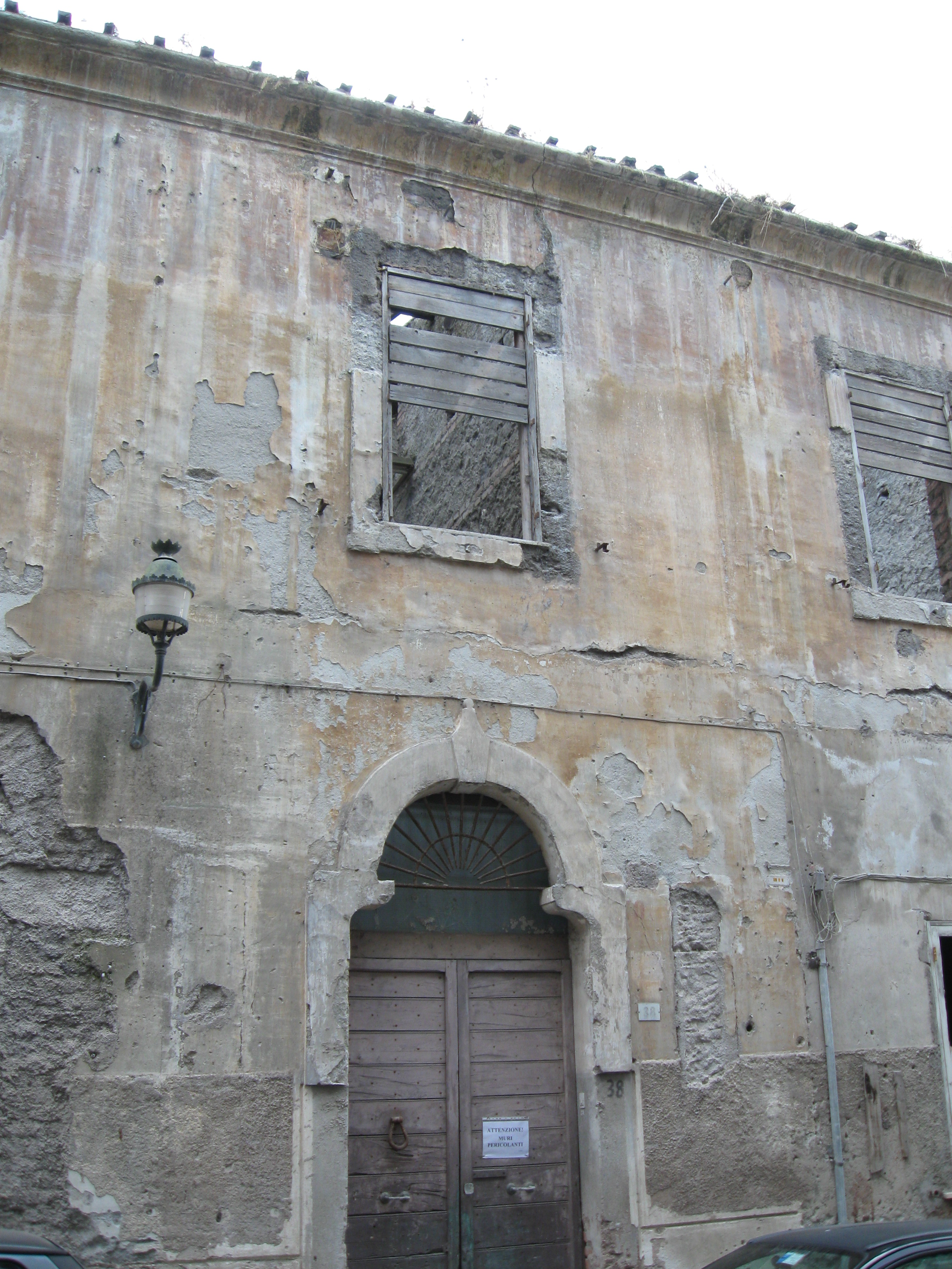 Palazzo Pamhilj ad Albano laziale (RM): stallone